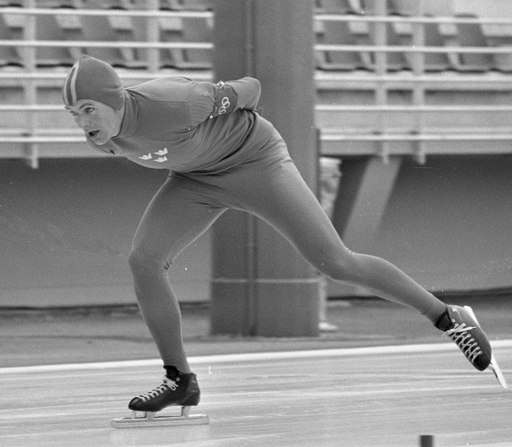 Örjan Sandler